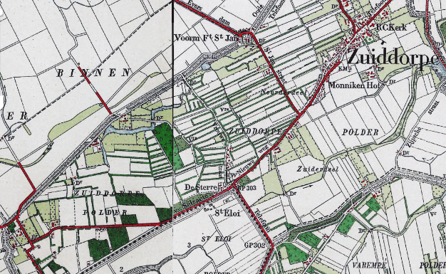 Zuiddorpepolder